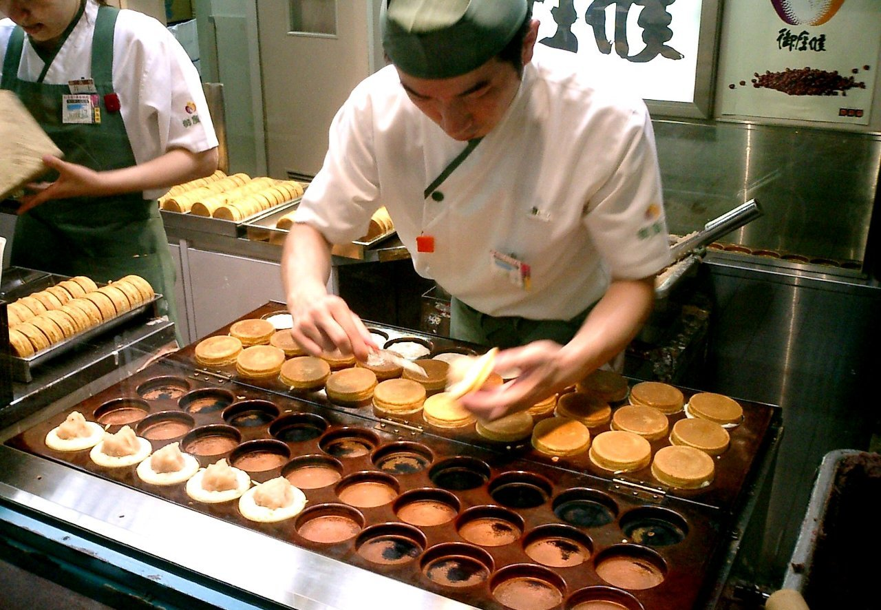 gozasoro